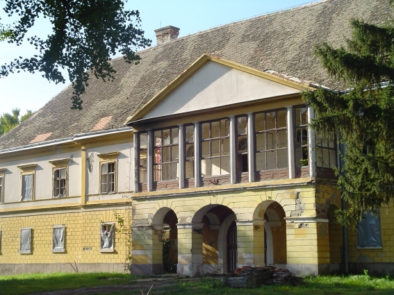 Dvorac u Dardi